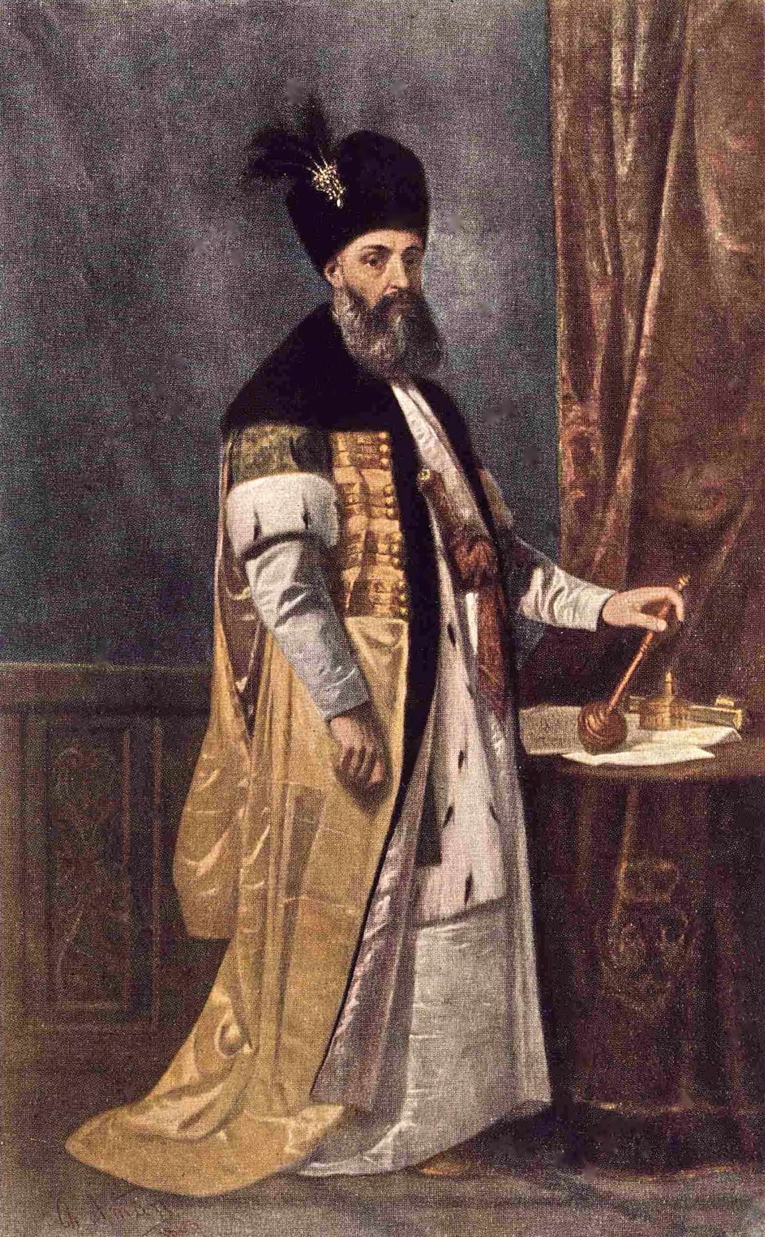 Grigore II Ghica (1695-1752)